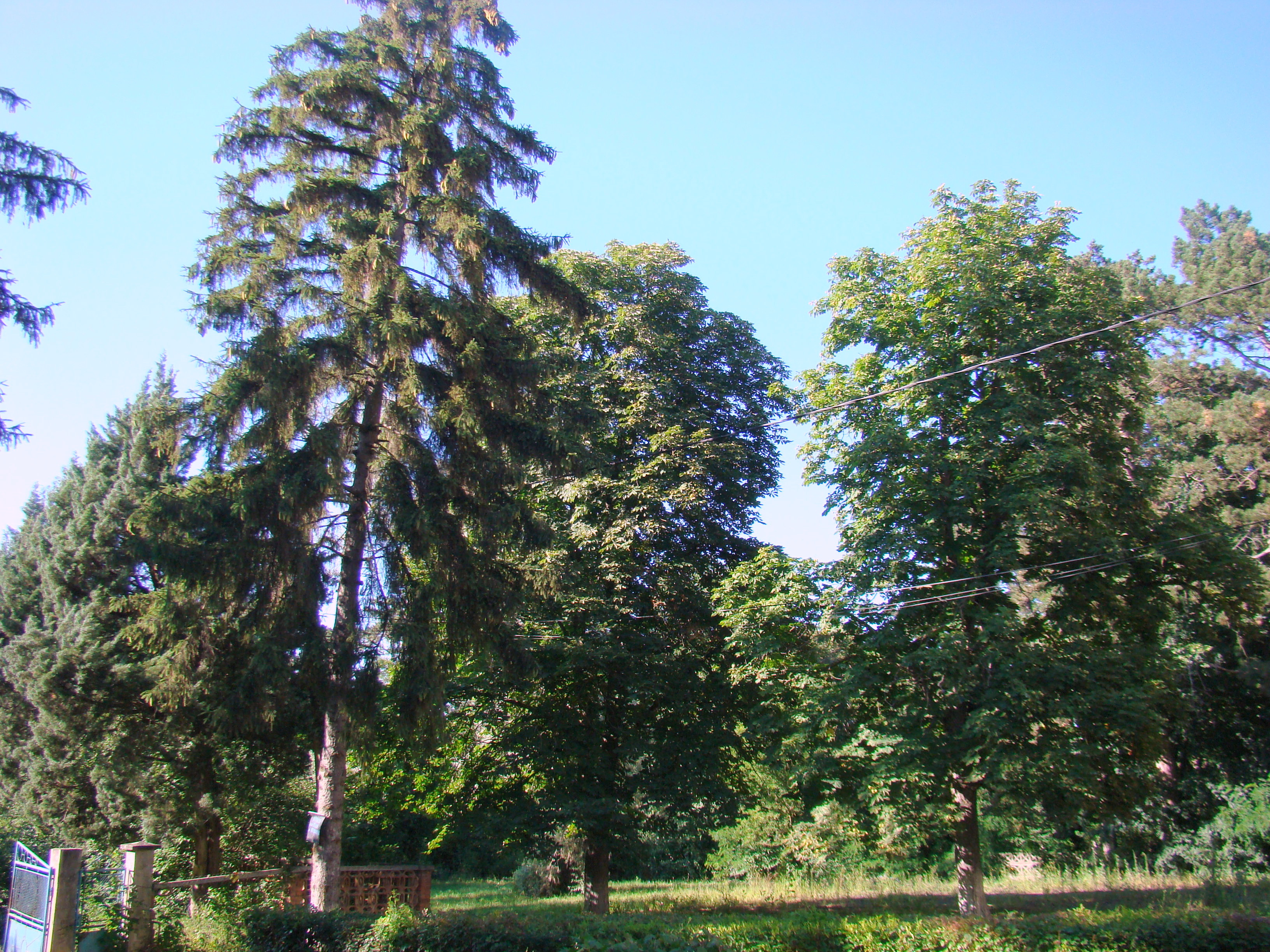 Parcul castelului Ugron, sat Zau de Câmpie; comuna Zau de Câmpie 02